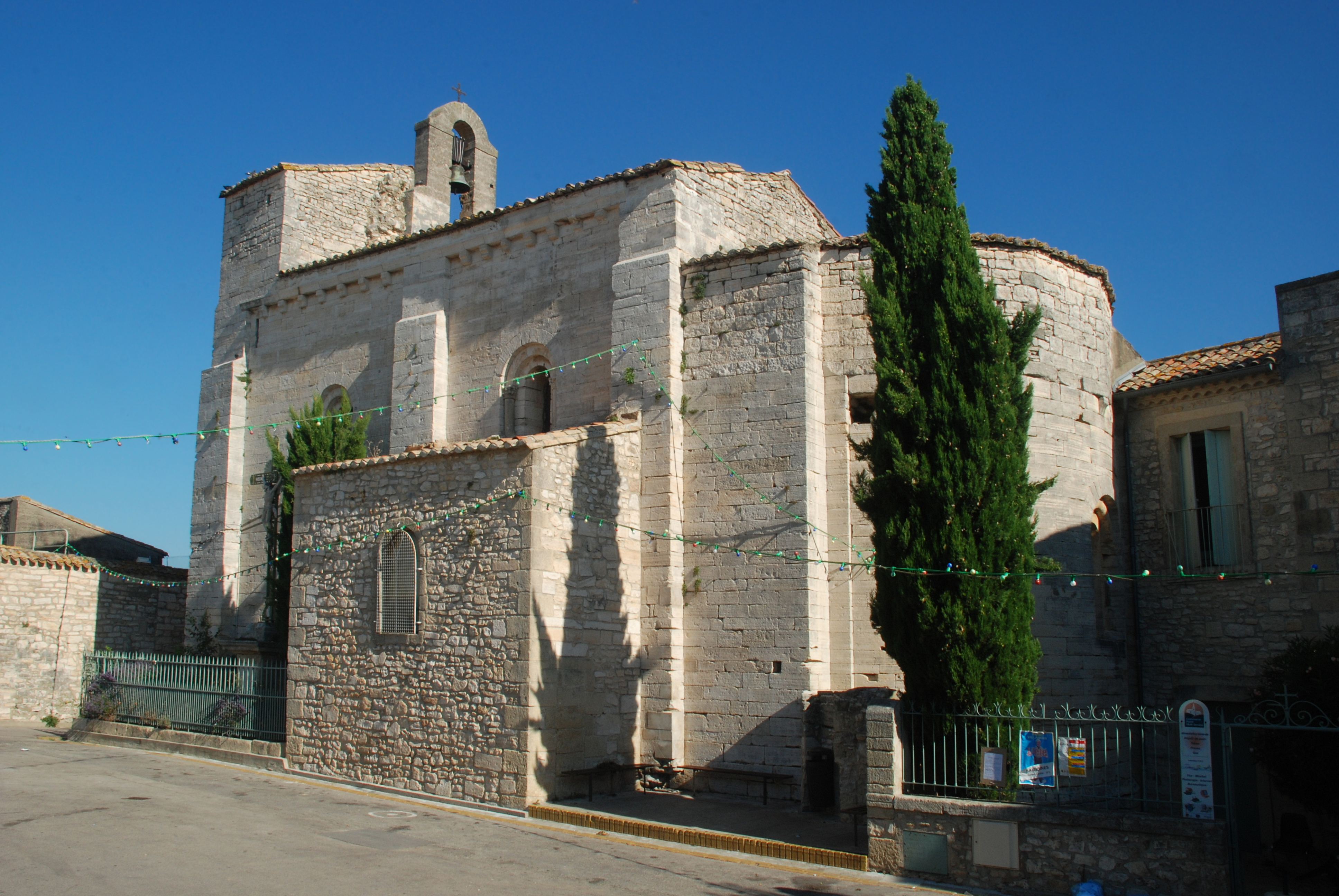 France - Languedoc - Hérault - Église Saint-Étienne de Saussines